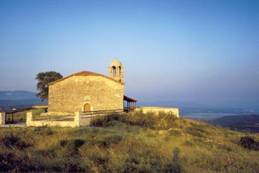 ΠΑΛΑΙΑ ΑΝΩ ΚΕΡΔΥΛΛΙΑ